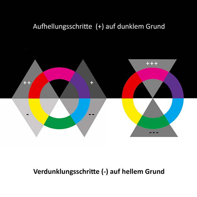 Korrelation der Helligkeits- und Farbtondifferenzierung des AMC zum Goethes Farbkreis, Bendin 2014